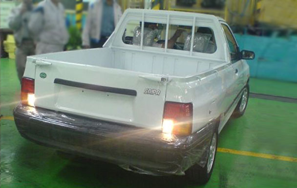 Saipa pick-up truck